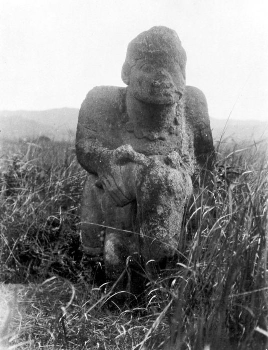 Repronegatief. Stenen beeld bij Pematang, omgeving Palembang